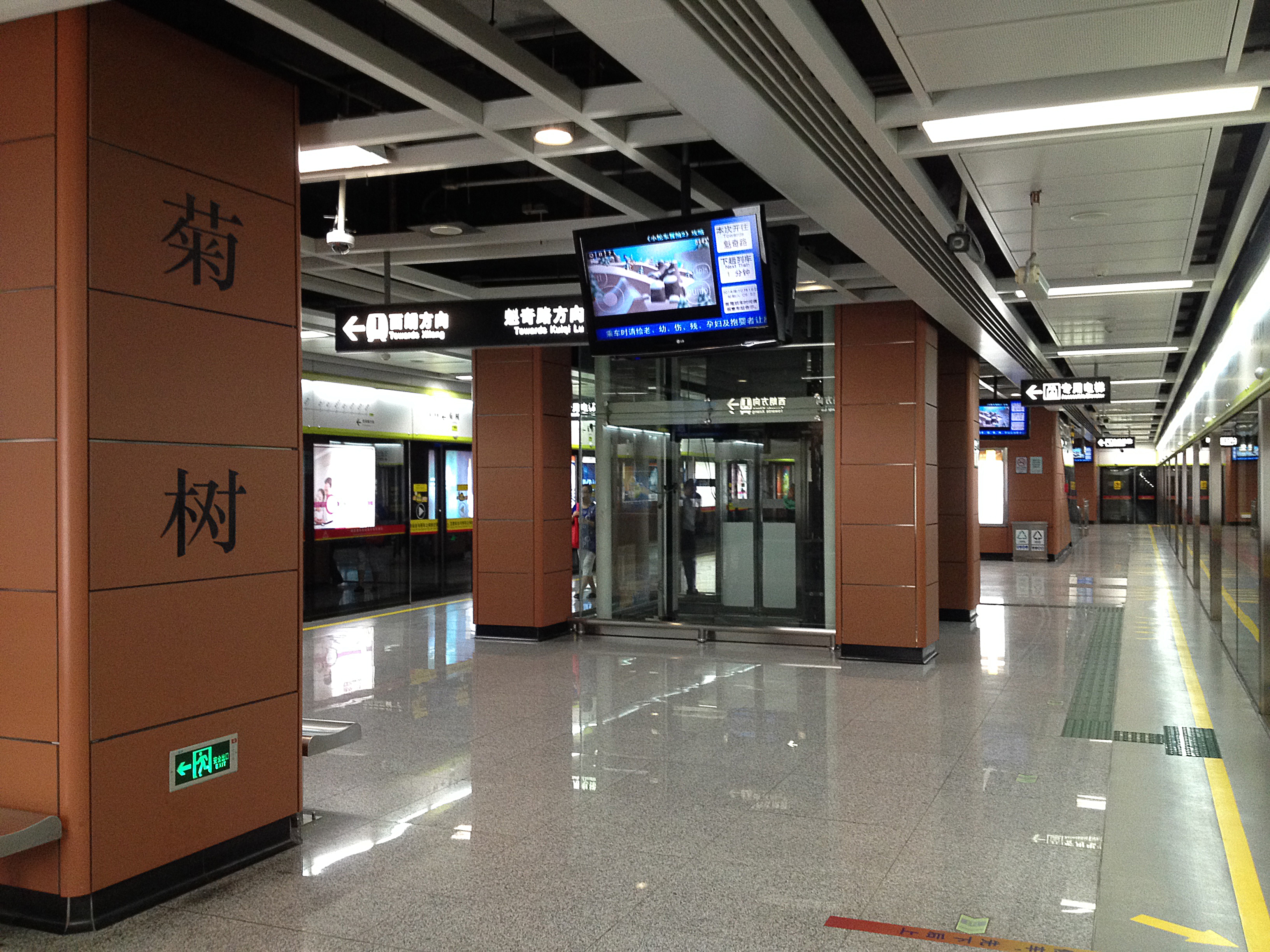 广州地铁菊树站月台（往魁奇路方向）